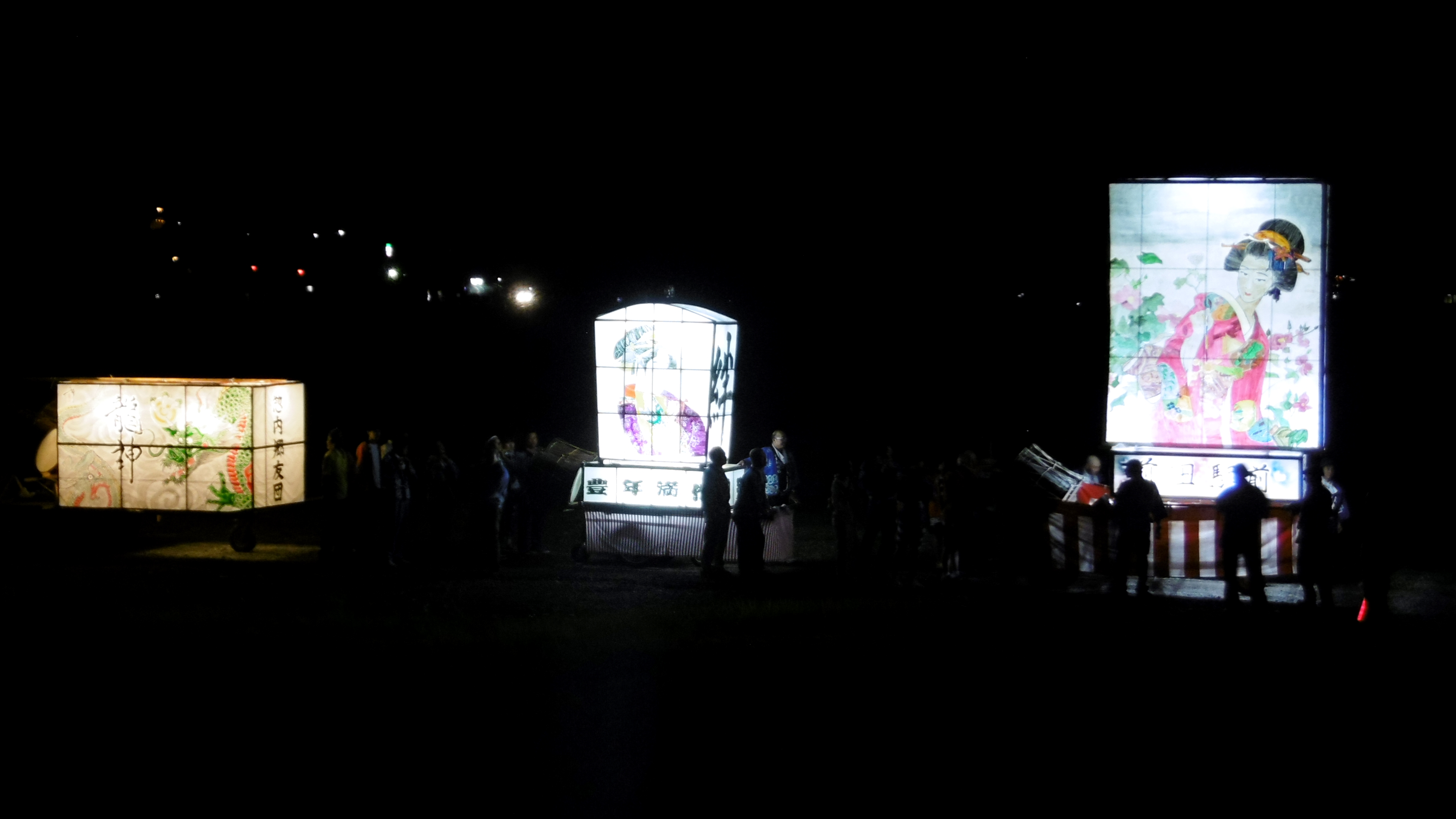 森吉山麓たなばた火まつり たなばた絵灯籠行列-北秋田市 阿仁前田河川公園